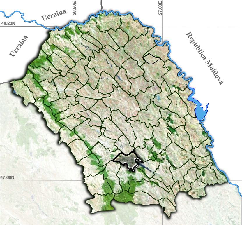 Baluseni jud Botosani.